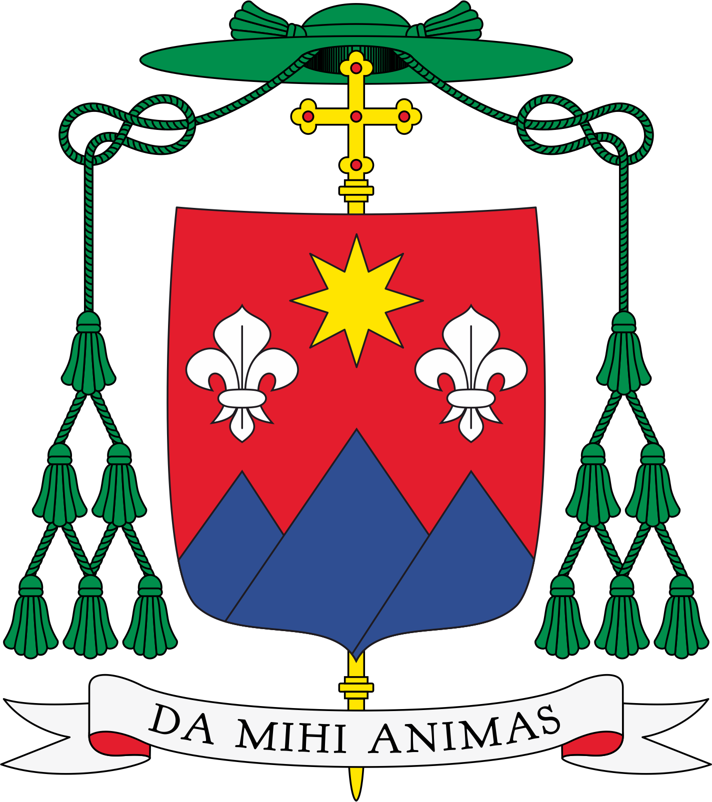 Vladimír Fekete, erb